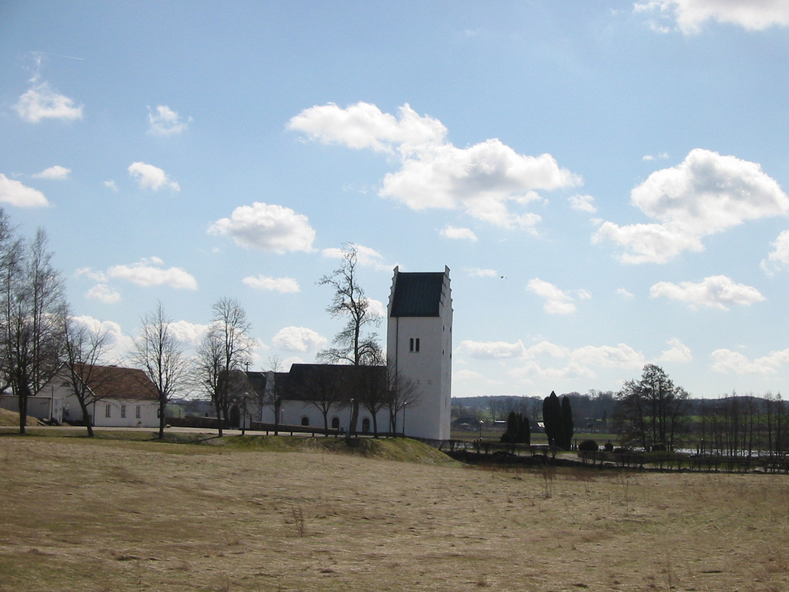 Gårdstånga Kyrka. Taget av Richard Johansson.